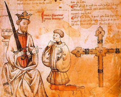 El rey Sancho IV de Castilla (1258-1295)